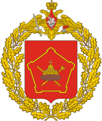 Эмблема Московского военного округа